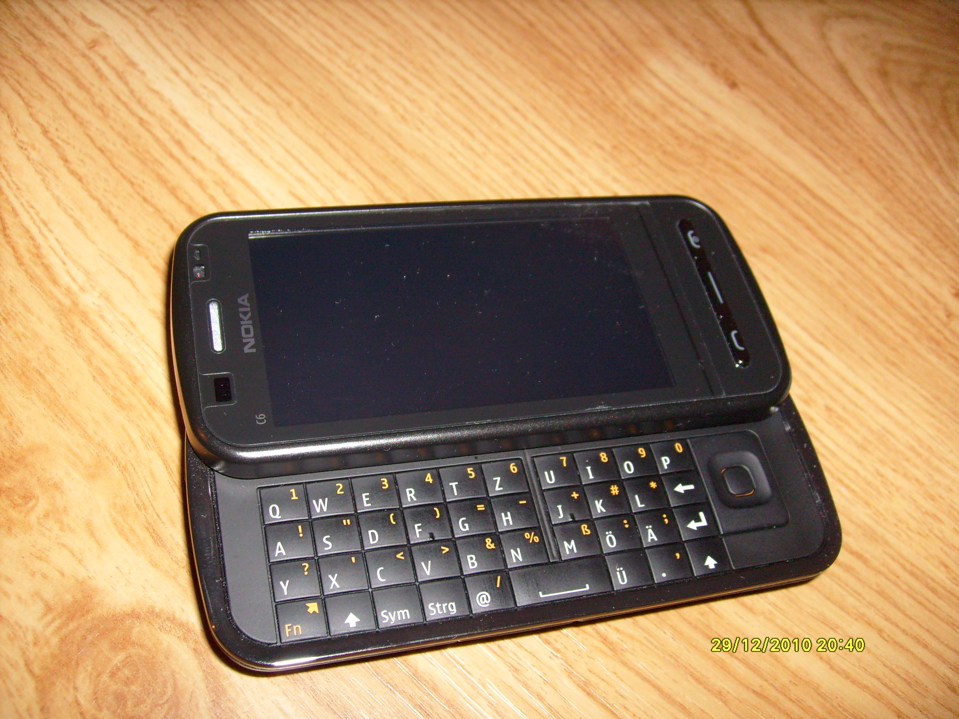 Das Nokia C6-00 ohne Branding